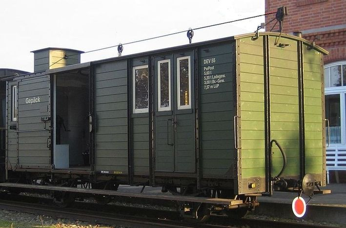 Packwagen DEV 55 mit Görlitzer Gewichtsbremse